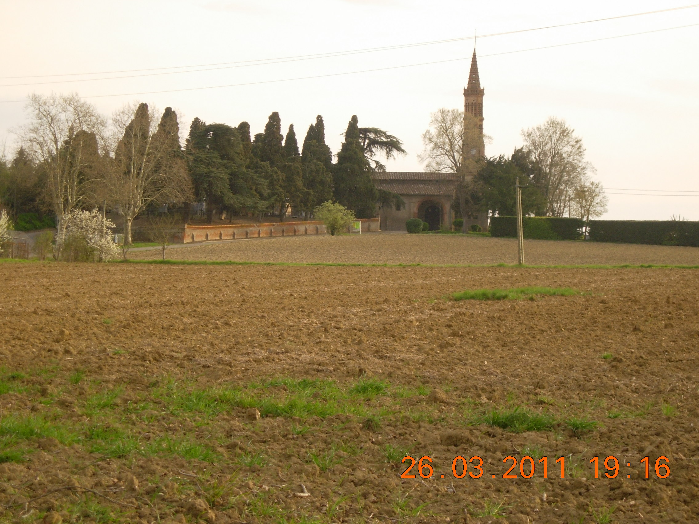 Le cimetière est visible devant l'église, surélevé entre des murs de soutènement : il s'agit d'une pratique assez courante ici, à cause des très grosses pluies de printemps.